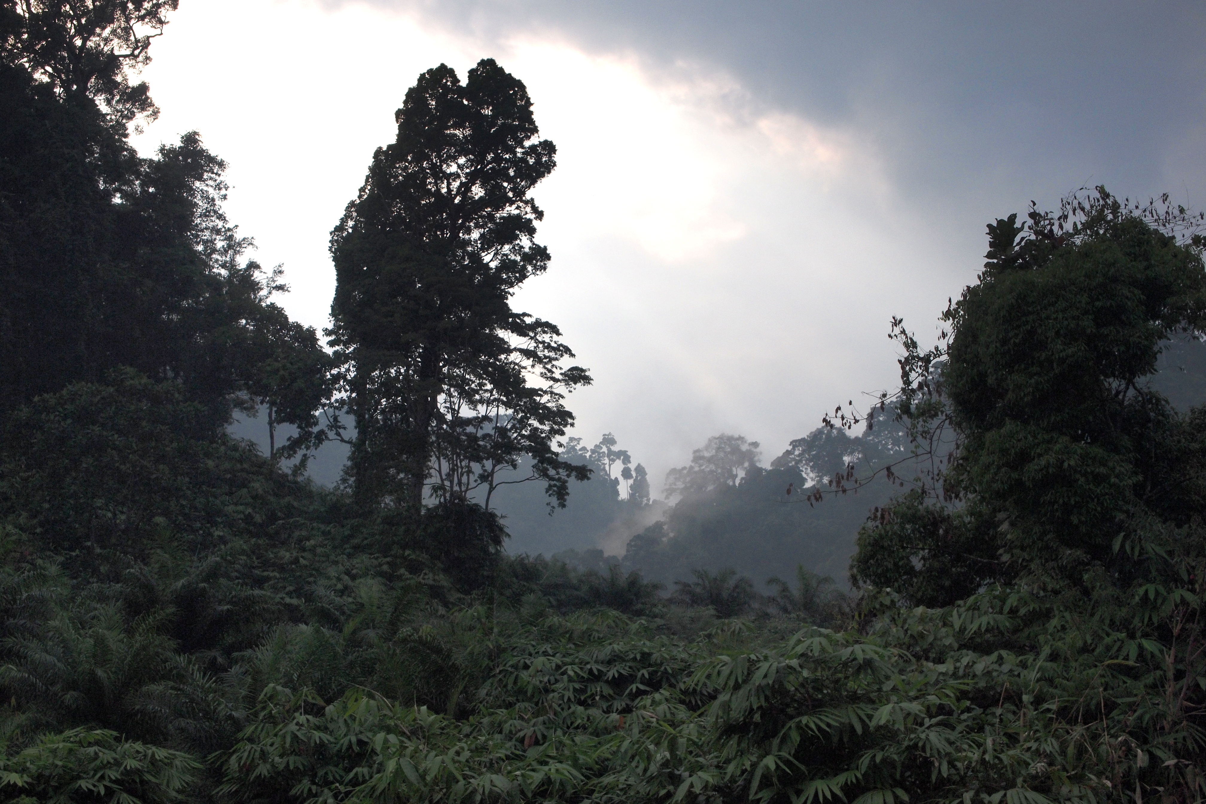 อุทยานแห่งชาติเขาหลัก-ลำรู่